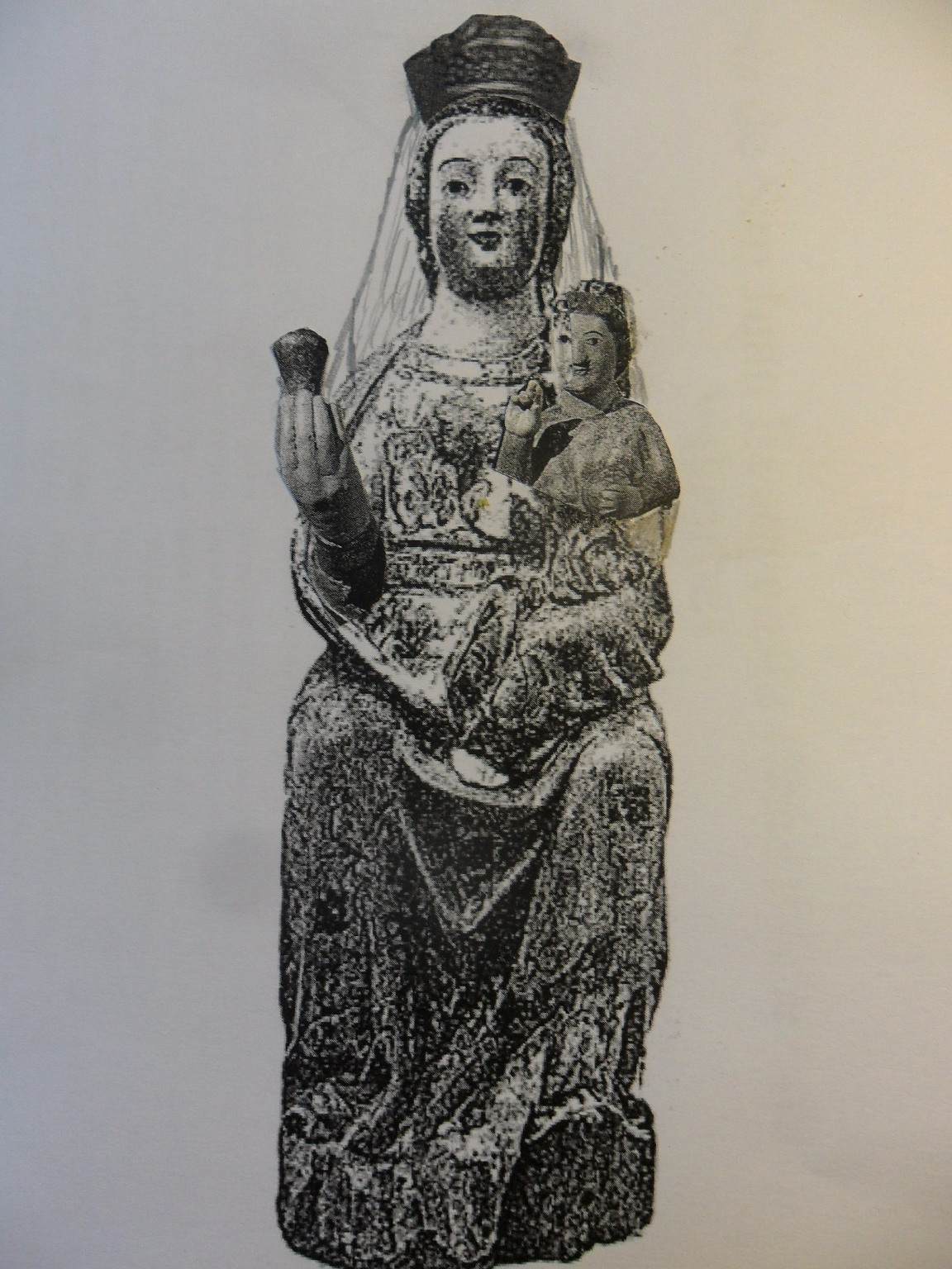 Nª Sª de San Juan 1300-1400 (reconstrucción desde la talla conservada en el Museo Diocesano de Valladolid